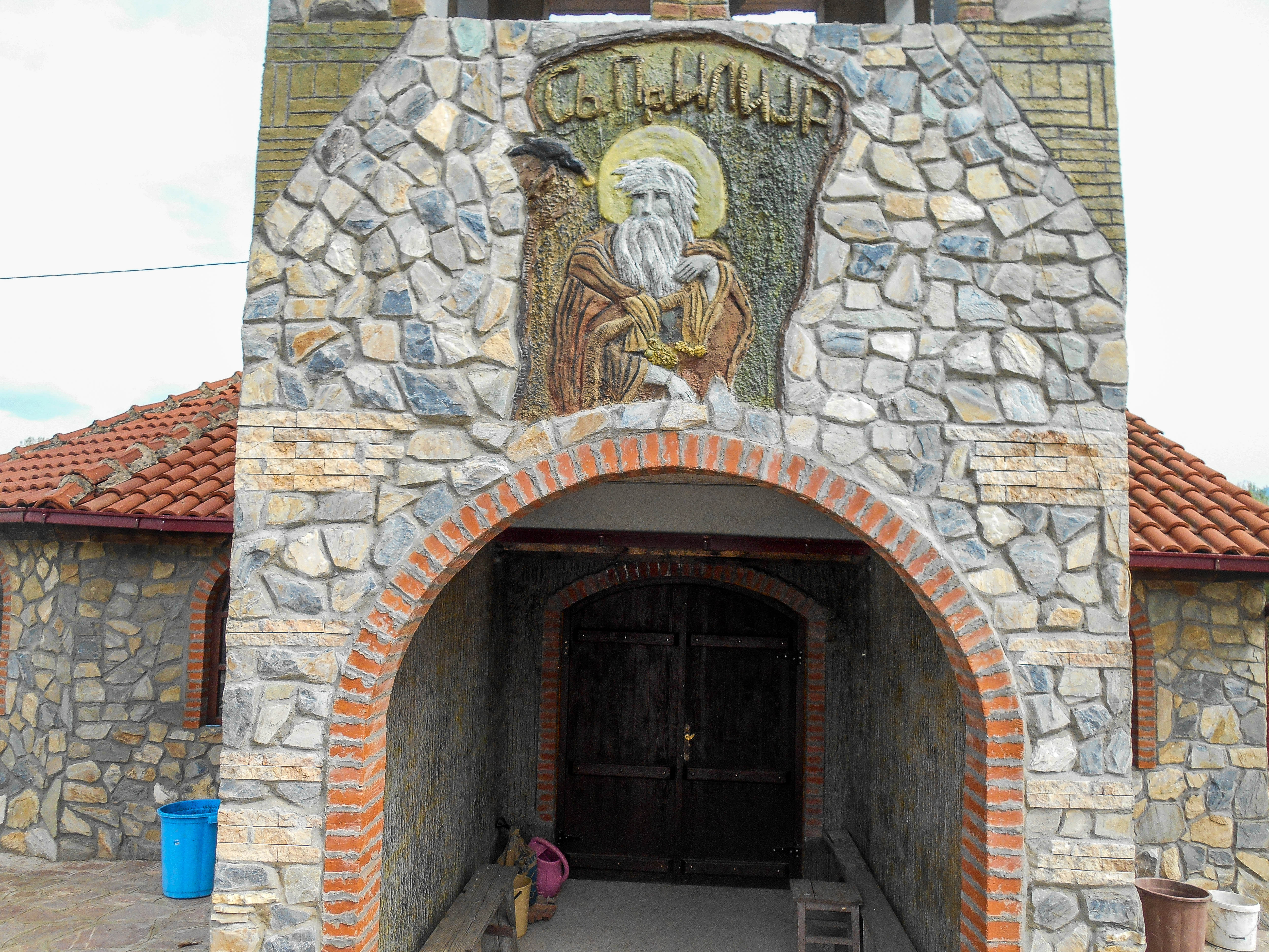 Црквата Свети Илија во Градско Балдовци